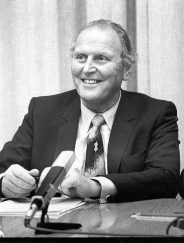 Willi Ritschard, Schweizer Bundesrat (Regierungsmitglied)